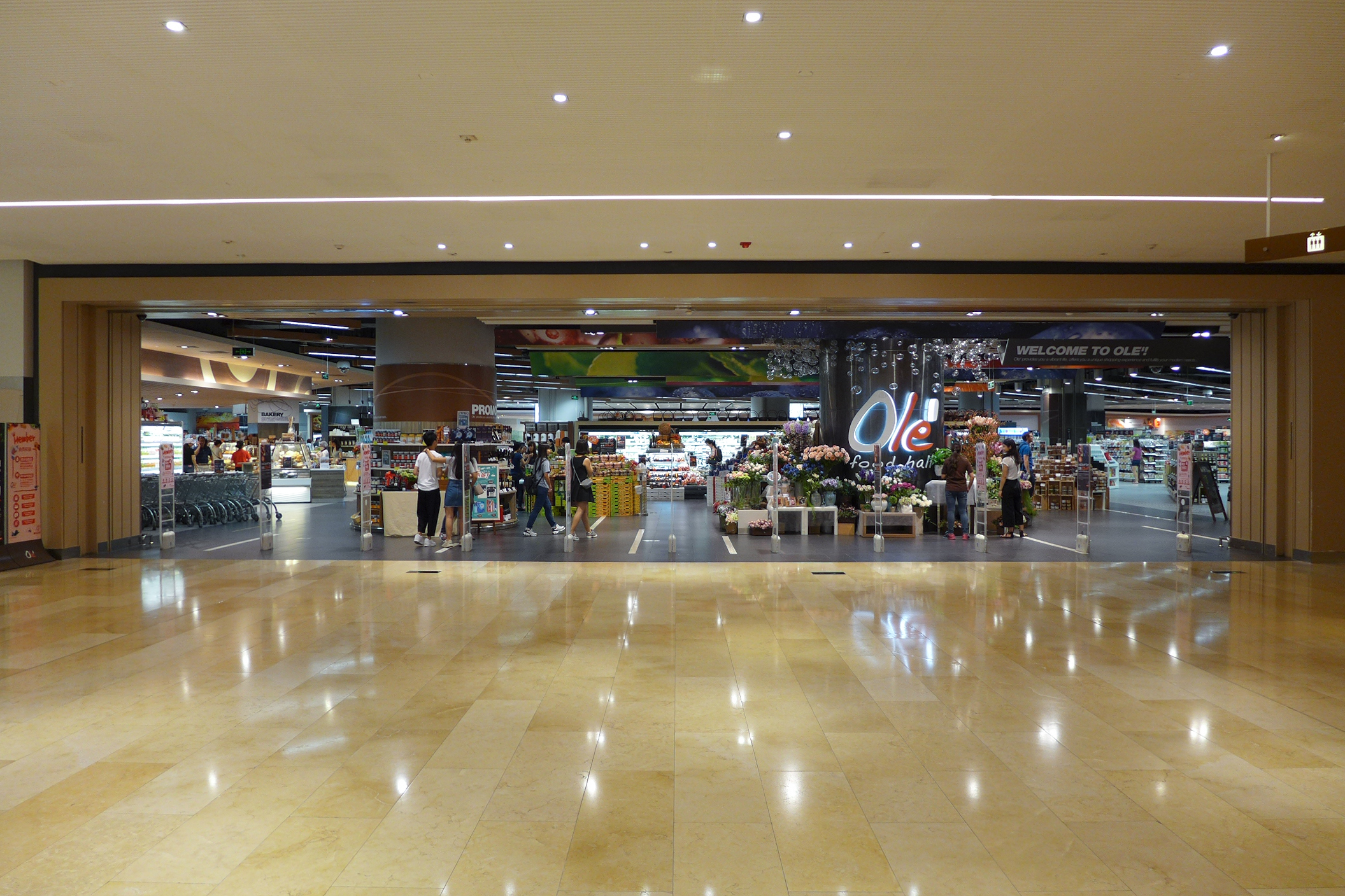 Ole Supermarket in TaiKoo Hui